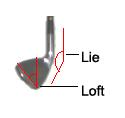 Klubbladets delar. Bild skapad av Stefan Berg 2005-05-07.